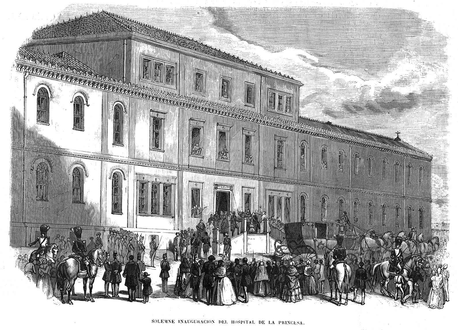 Solemne inauguración del Hospital de la Princesa, en la revista española El Museo Universal.